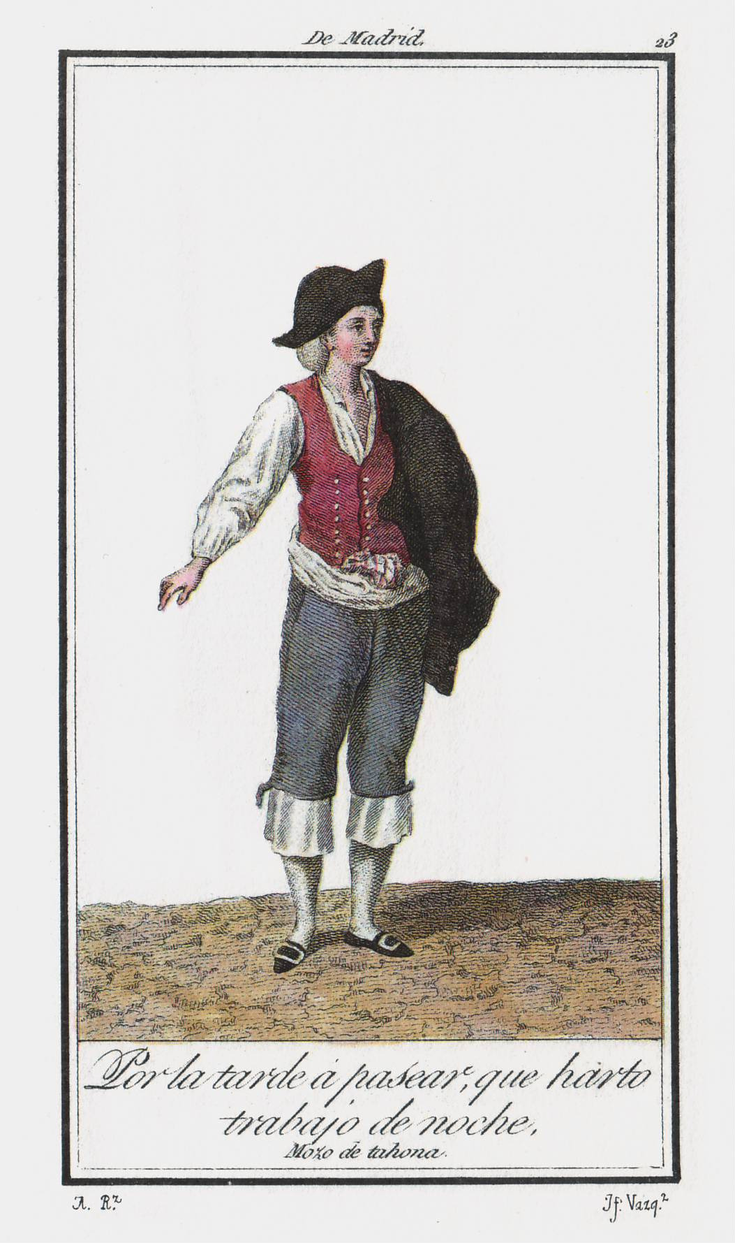 Antonio Rodríguez (1765–1823) Alternative names Antonio RodríguezDescriptionSpanish engraver and painterDate of birth/death 1765 1823 Location of birth/death Valencia ValenciaWork location Madrid. ValenciaAuthority control : Q19839243 VIAF: 99638871 ISNI: 0000 0001 0928 4589 ULAN: 500037980 LCCN: n83012058 GND: 143185209 WorldCat creator QS:P170,Q19839243 (Valencia, 1765 - Madrid, ca. 1825); Grabado y dibujado por Antonio Rodríguez; publicado en 1801. Reproducción facsímil de treinta y ocho estampas, más catorce variantes, de los Trajes de Madrid. Todas iluminadas. Introducción de Juan Carrete Parrondo, Madrid (1989). ISBN 84 78120696.